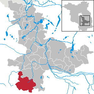 Heideblick in Brandenburg (Country) - District Dahme-Spreewald